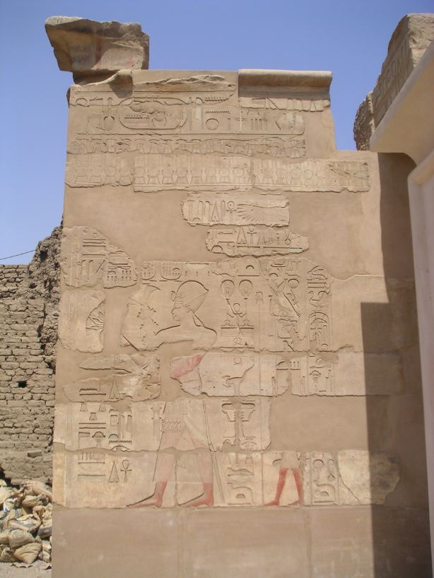 Paroi de la cour de Thoutmôsis IV reconstituée au Musée en plein air de Karnak